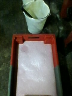 Levurage en vinification